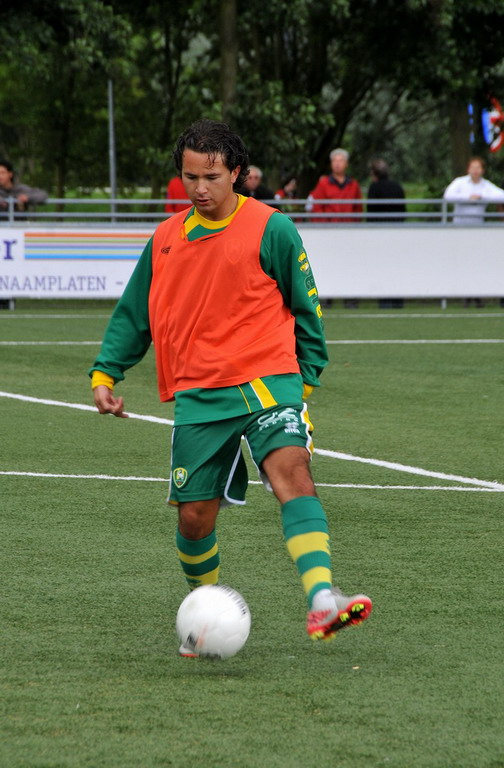 Middenvelder Wouter de Vogel (Gouda, 17 september 1990) tijdens een training van ADO Den Haag